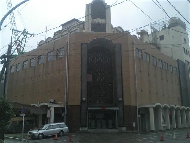 2006年8月9日投稿者撮影。浜松町移転後。